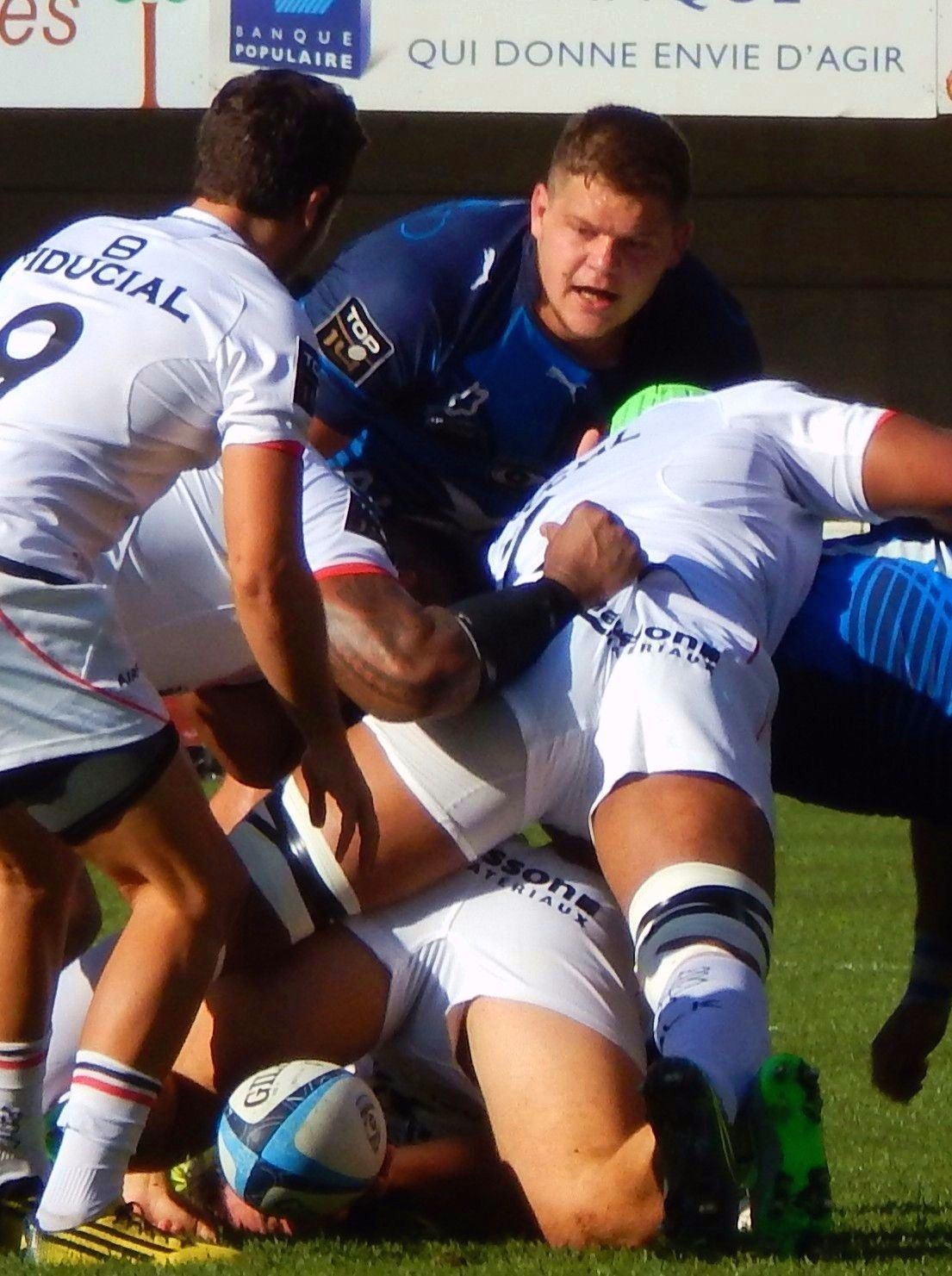 Paul Willemse (Montpellier HR), octobre 2015.